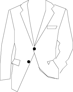 Tecknad bild på enkelknäppt kavaj med två knappar och trubbiga slag. Teckning: Arbapp